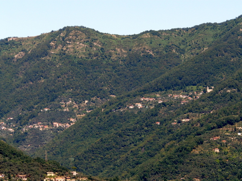 Panorama delle frazione di San Quirico e Montepegli, Rapallo, Liguria, Italia